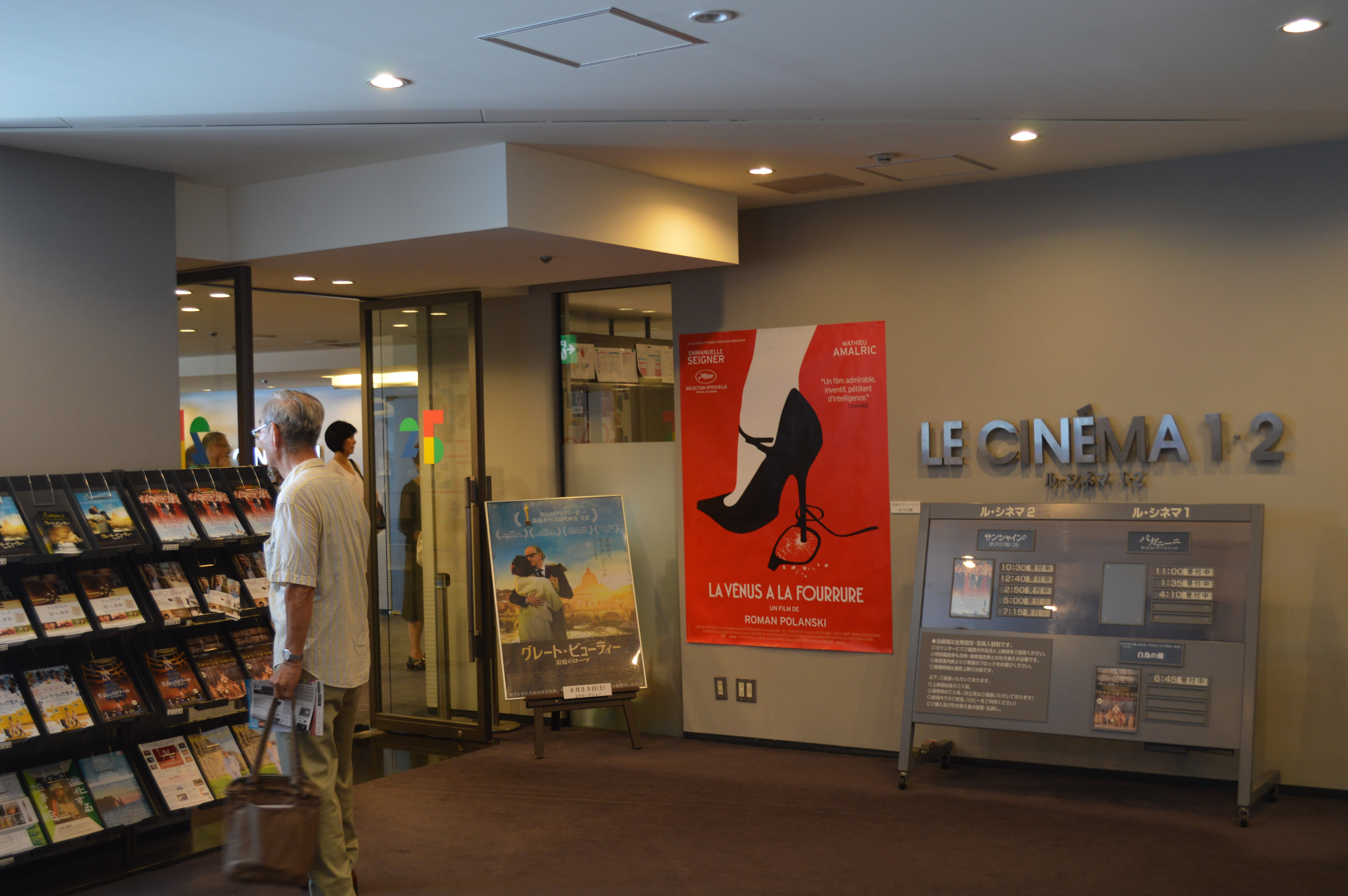 東京・渋谷のBunkamura（東急文化村）にある映画館「ル・シネマ」。